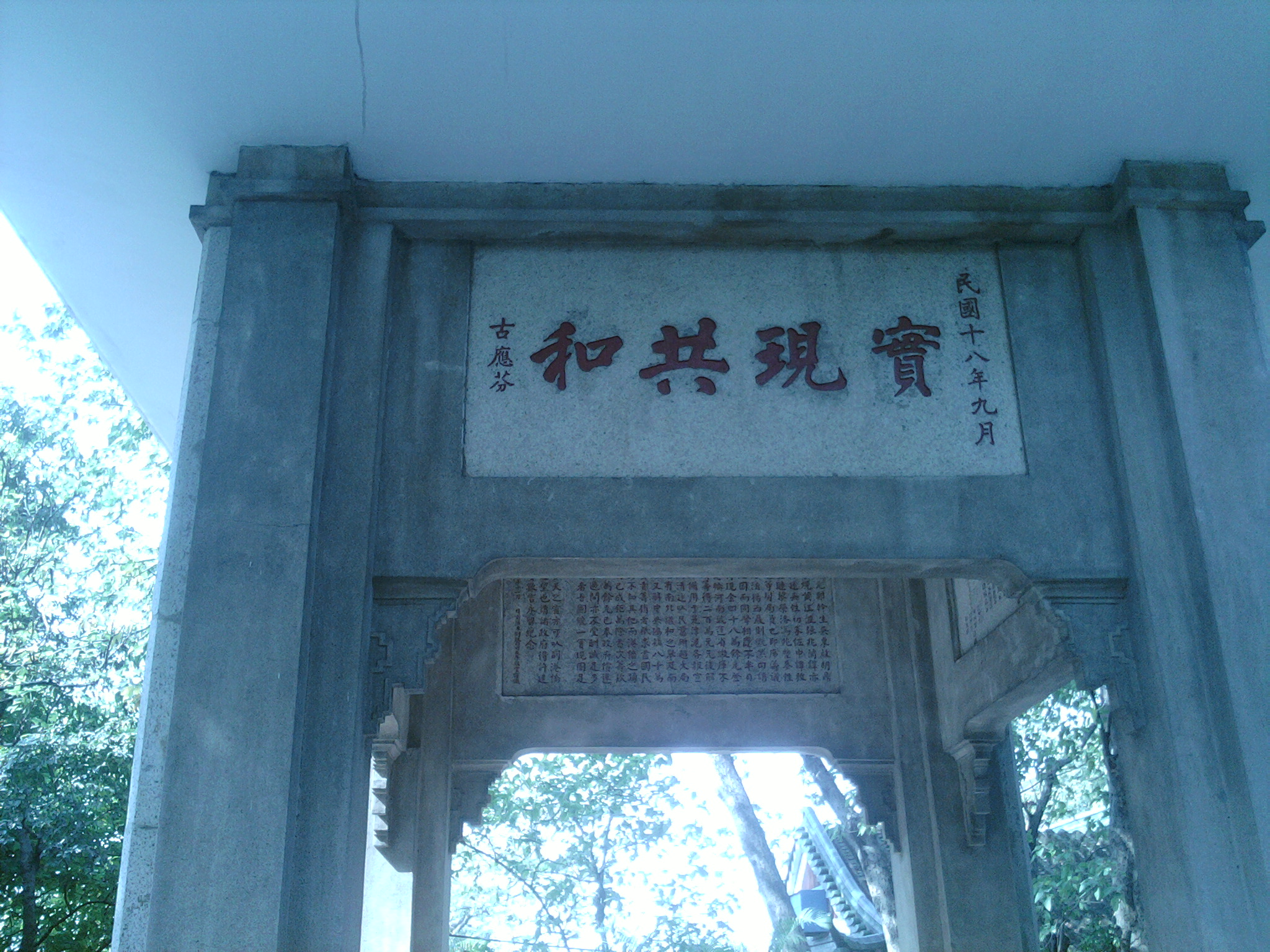 民國十八年九月 實現共和 古應芬